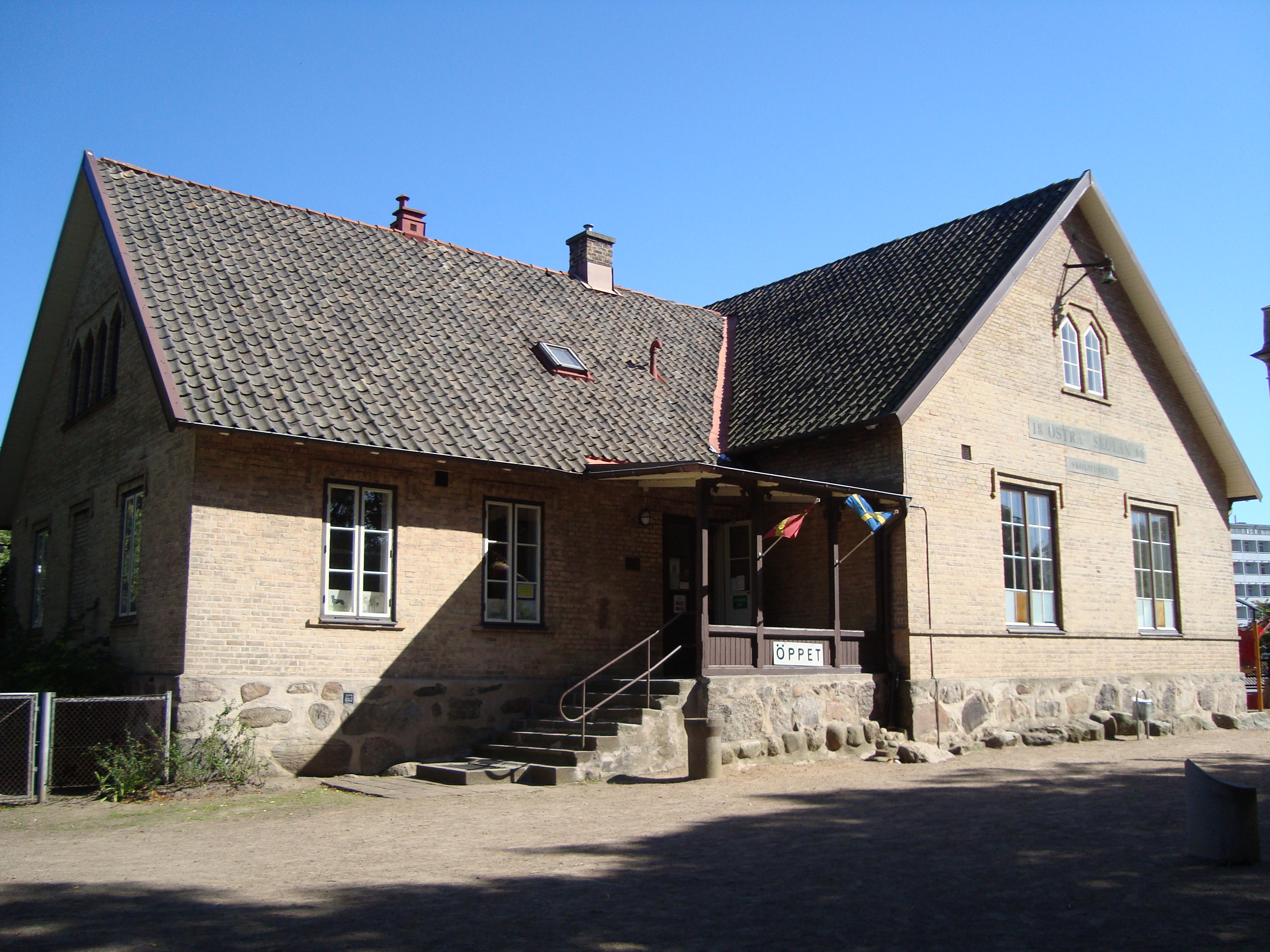 Östra skolan i Helsingborg, numera Helsingborgs skolmuseum.